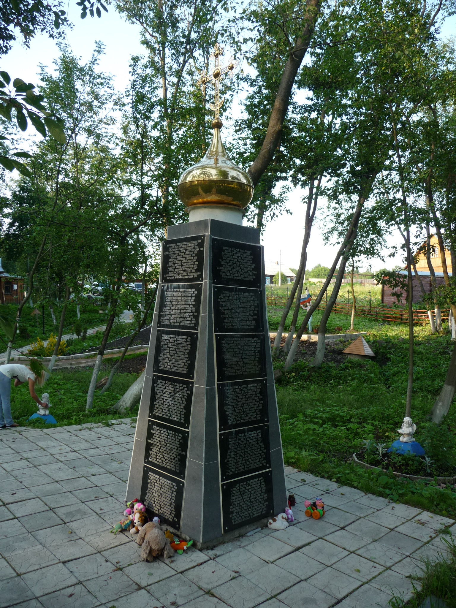 MoscowRegion-p1030244.jpg